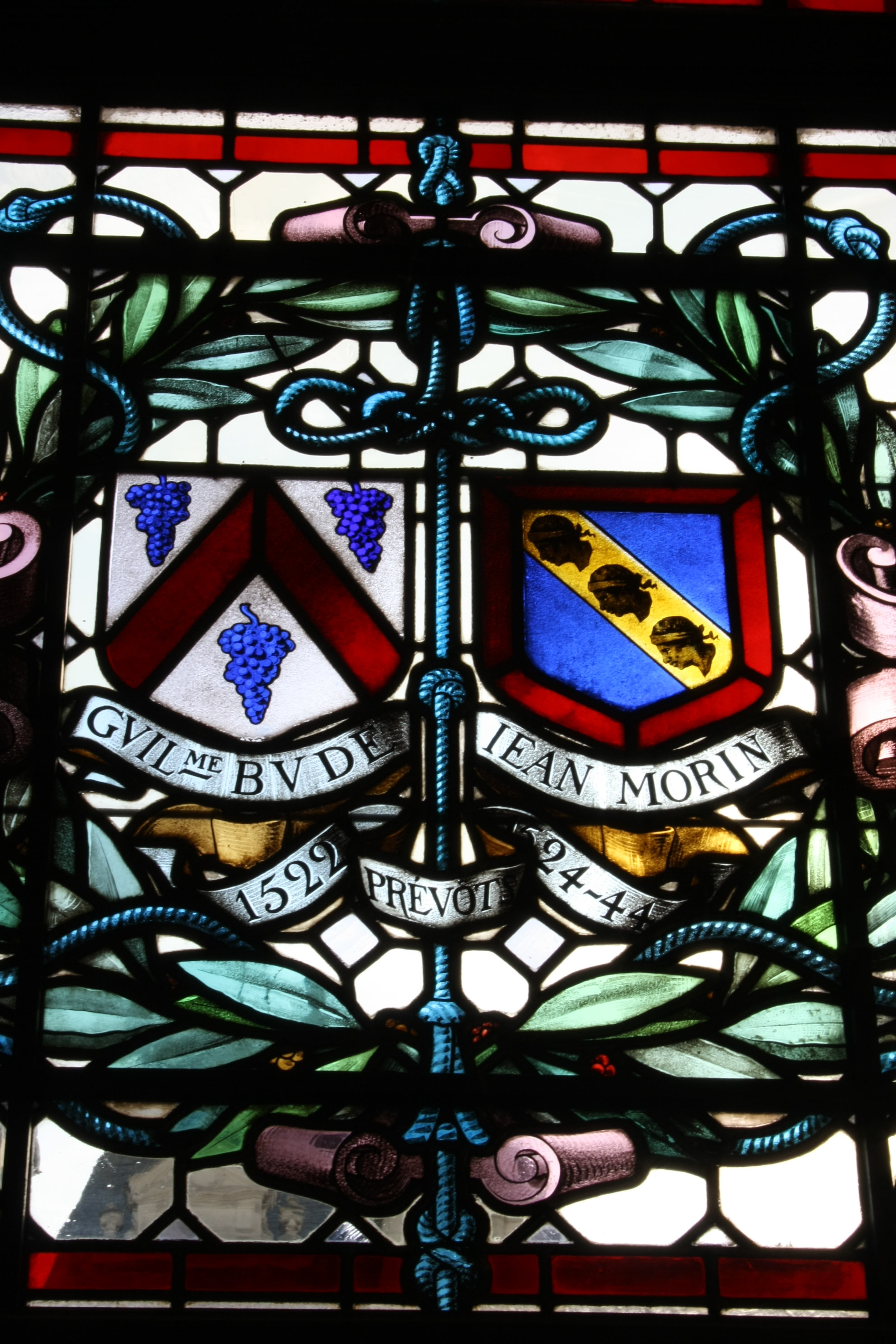 Bleiglasfenster im Rathaus von Paris (4. Arrondissement), "galerie du conseil", Darstellung: Wappen der Prévôt des marchands de Paris; Guillaume Budé (1522-1523) und Jean Morin (1524-1525)